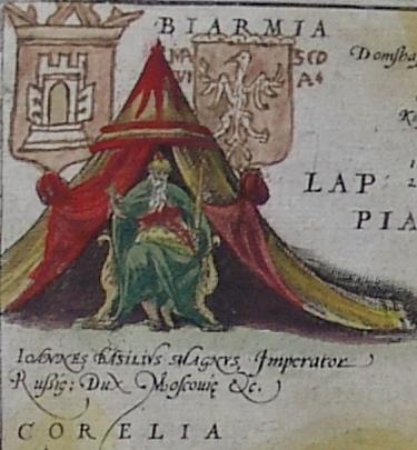 Ioannes Basilius Magnus Imperator Russic, Dux Moscovic